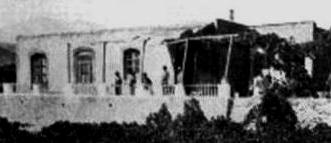 Cortijo de San Patricio circa 1910 date QS:P,+1910-00-00T00:00:00Z/9,P1480,Q5727902, lugar donde se perpetró el crimen de Gádor